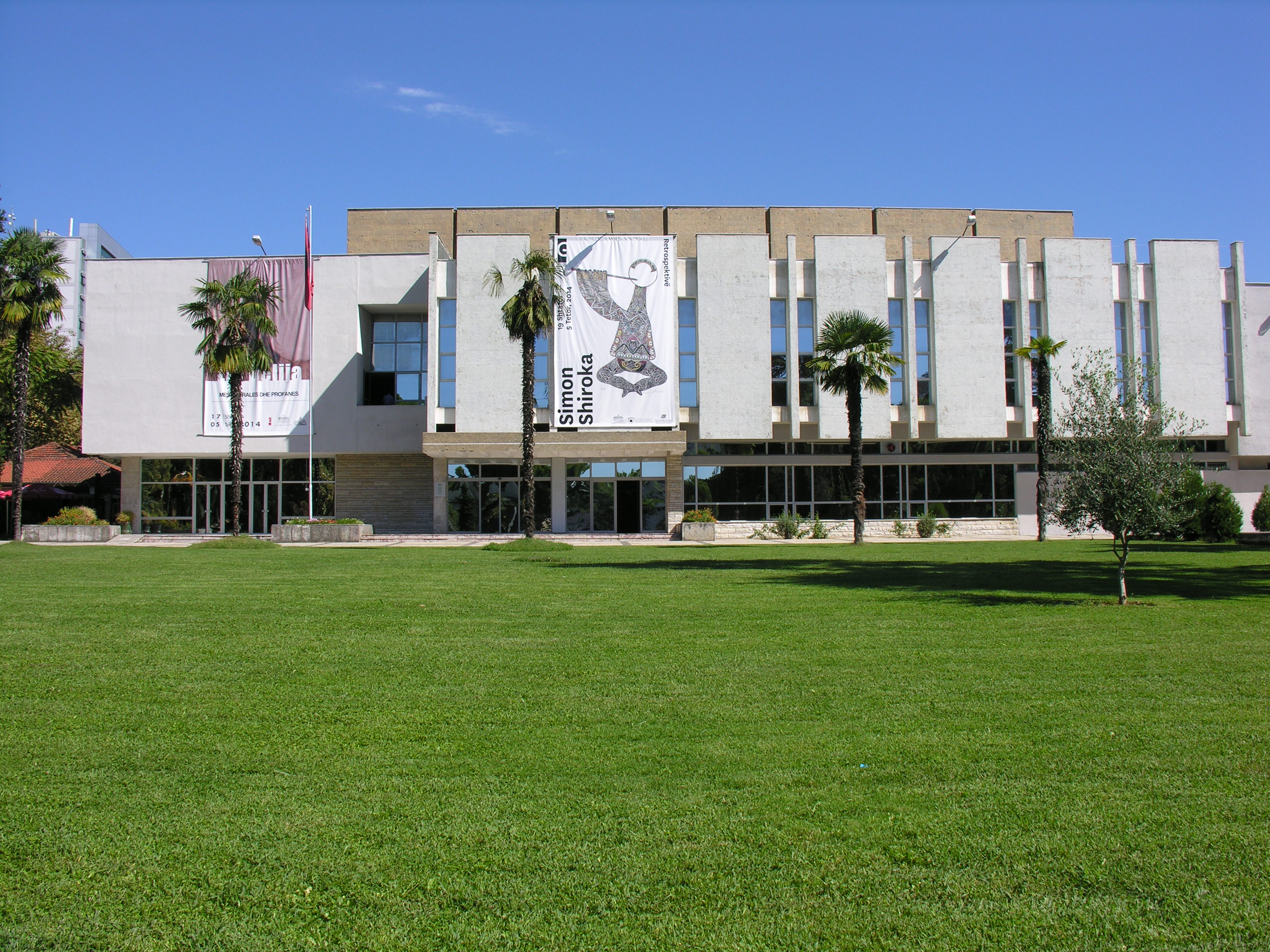 Galeria Kombëtare e Arteve